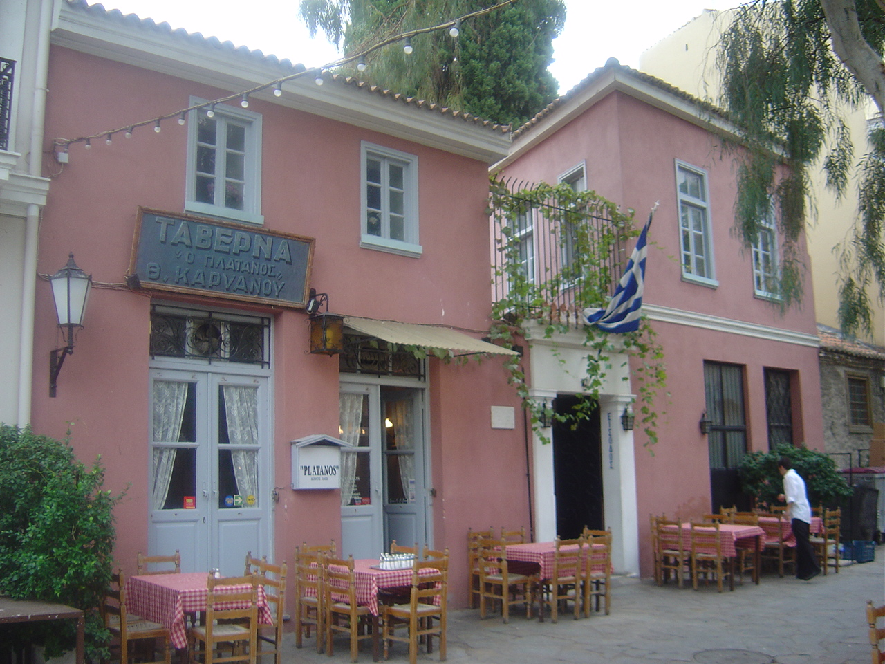 Το εργαστήριο του Φωκίωνα Ρωκ στην Αθήνα - Πλάκα, Οδός Διογένους 4.